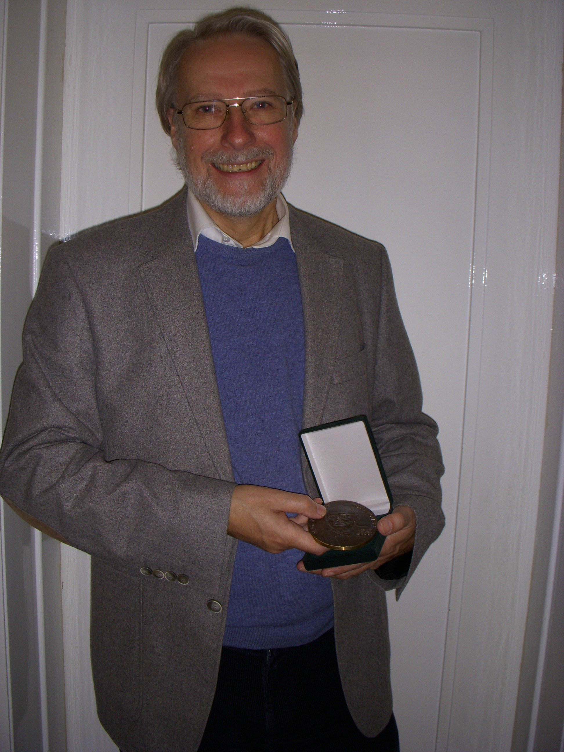 Bild